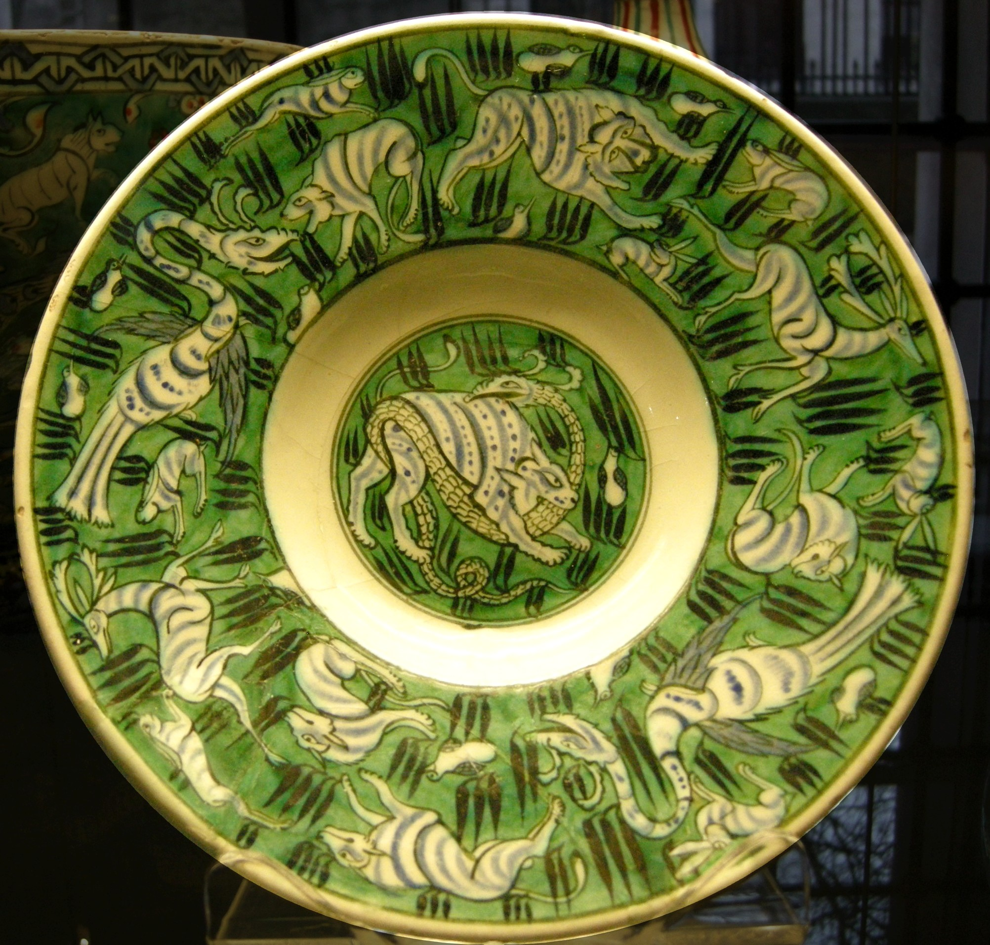 Iznik, piatto, 1560-65